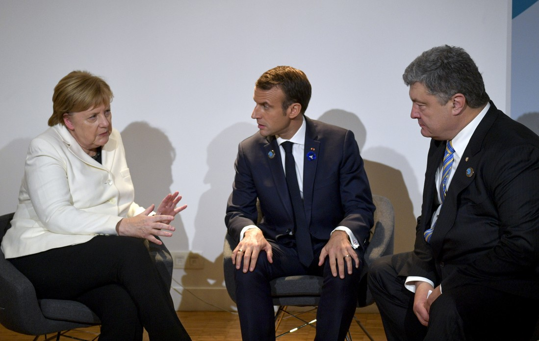 Angela Merkel, Emmanuel Macron, Petro Poroshenko